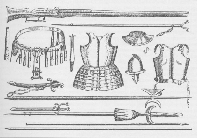 Снаряжение рядовых, урядников и начальных людей полков солдатского строяВооружение московского солдата (мушкетера и пикинера) середины XVII века: мушкет; сошка; мини-жаровня с горячими углями (для поджога фитиля); перевязь с натрусками, пороховницей и обмотанными вокруг нее фитилями; мешочек для пуль; латы и каска («шишак»); кожаный нагрудник (под кирасу); палаш; шпага; алебарда; протазан; пики. Гравюра из книги: "Учение и хитрость воинского строя", М., 1649